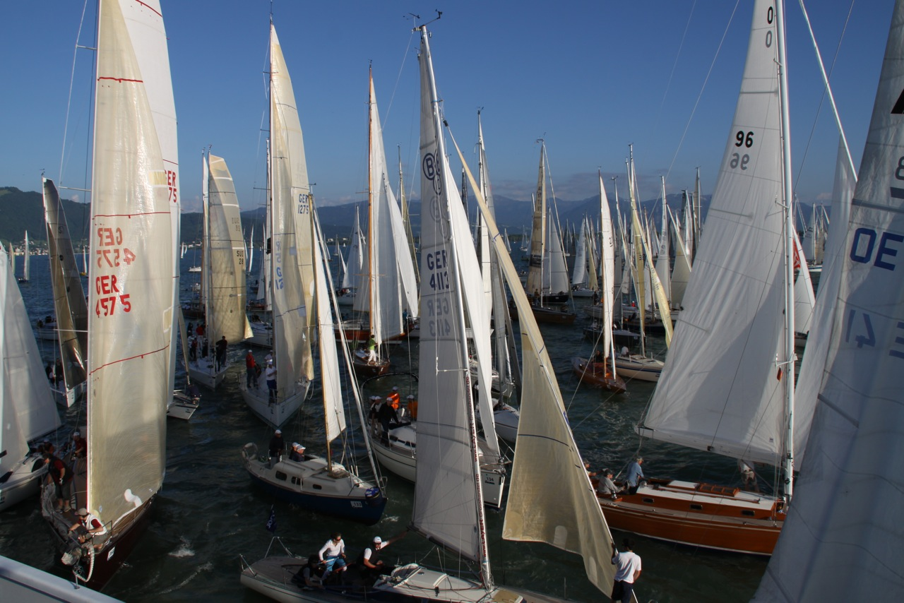 Rundum2010_Blick vom Startschiff